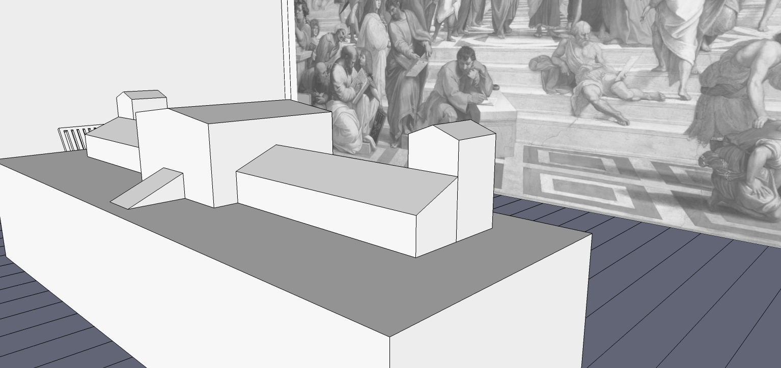 Vista prospettica della sala mostra Architettura-Idea, progettata da Luca Meda e presentata all'interno della mostra Il progetto di architettura alla XVI edizione della Triennale di Milano